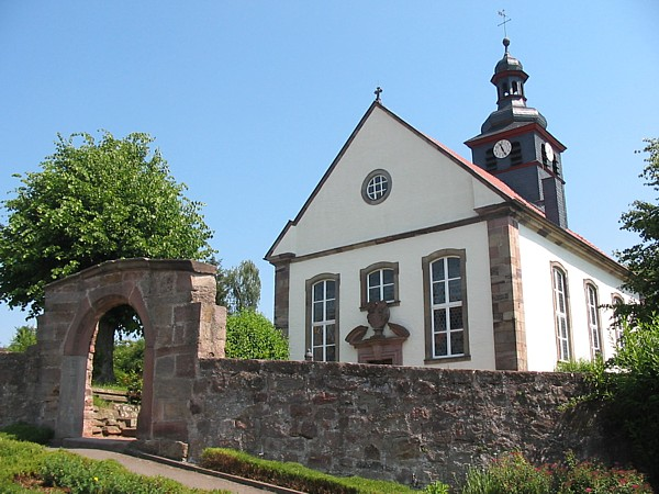 Am 14. Oktober 1748 wurde der Kirchenbau vollendet.